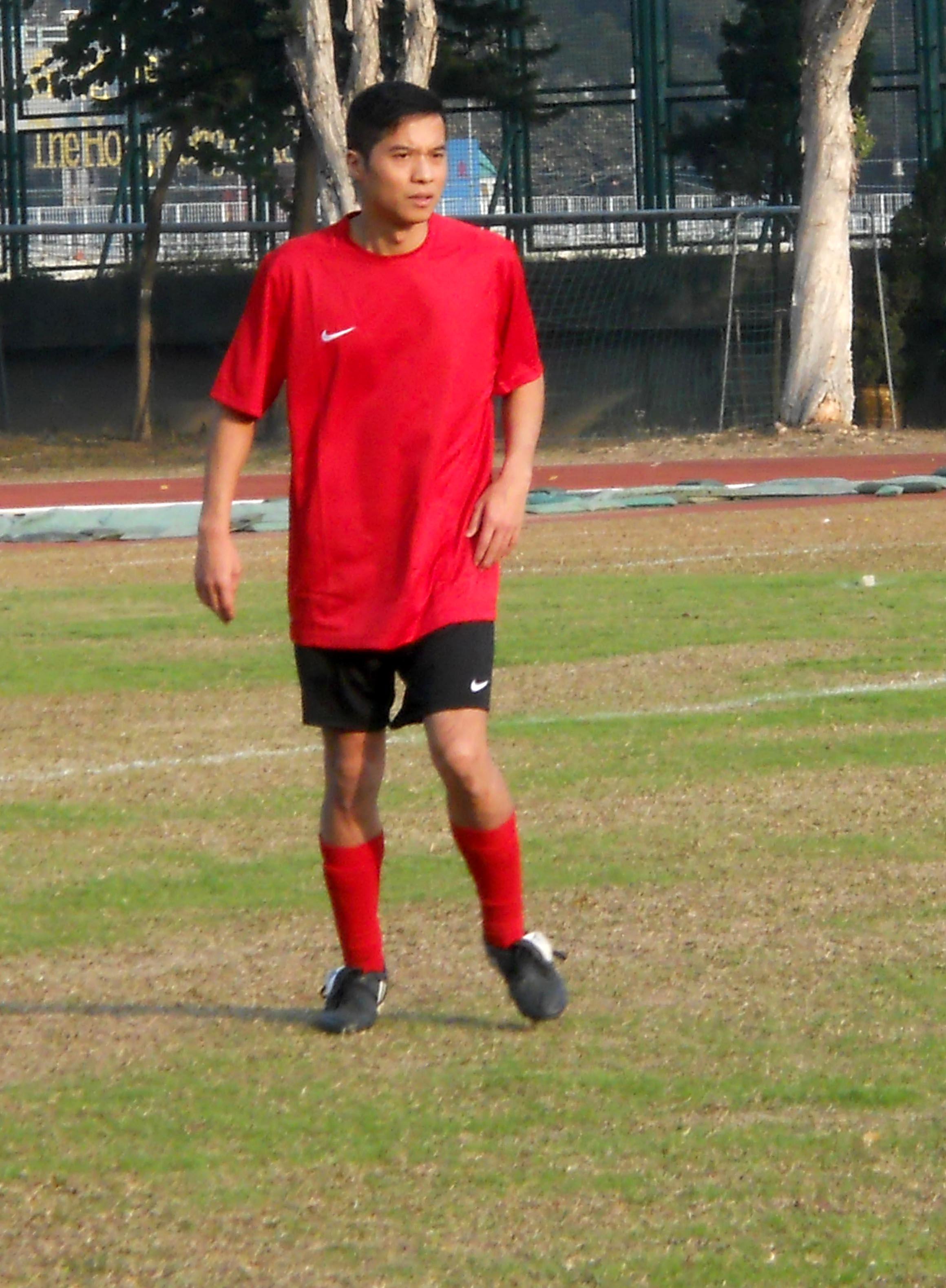 中文（香港）: 劉健基